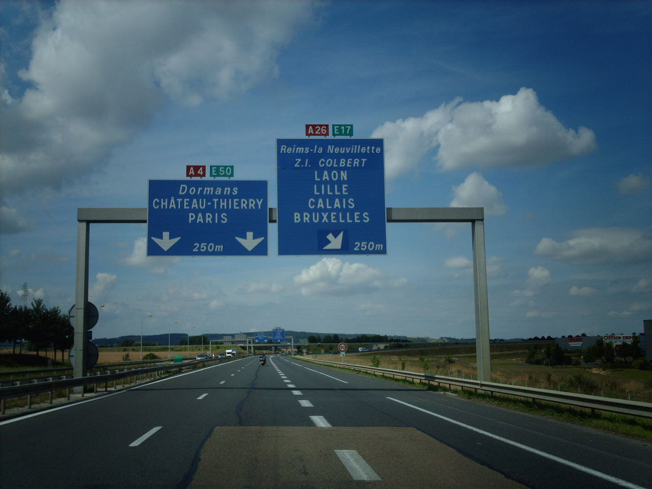 Echangeur A4-A26